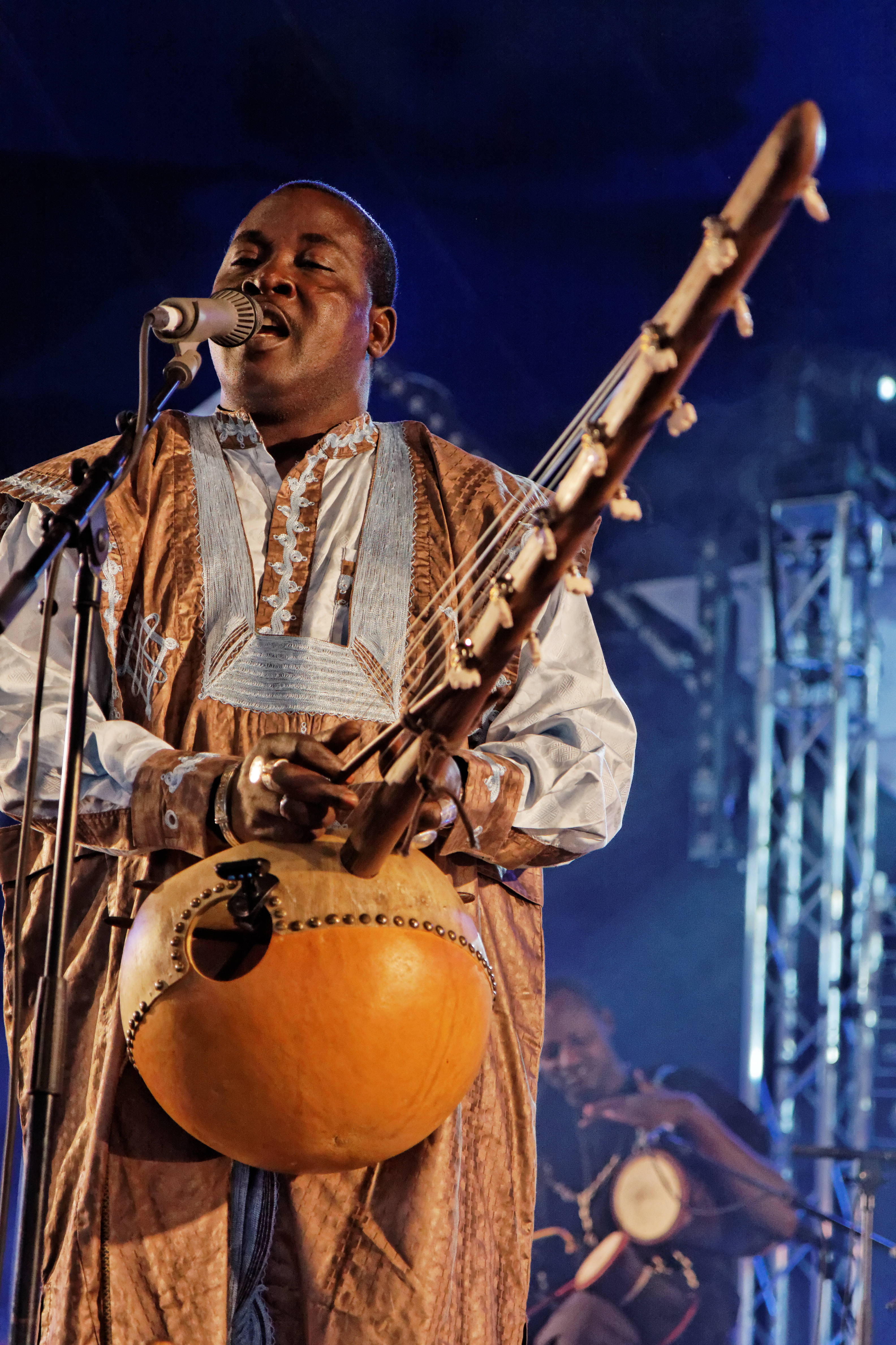 Mamar Kassey en concert sur la scène Cabaret lors du festival du bout du Monde à Crozon dans le Finistère (France).